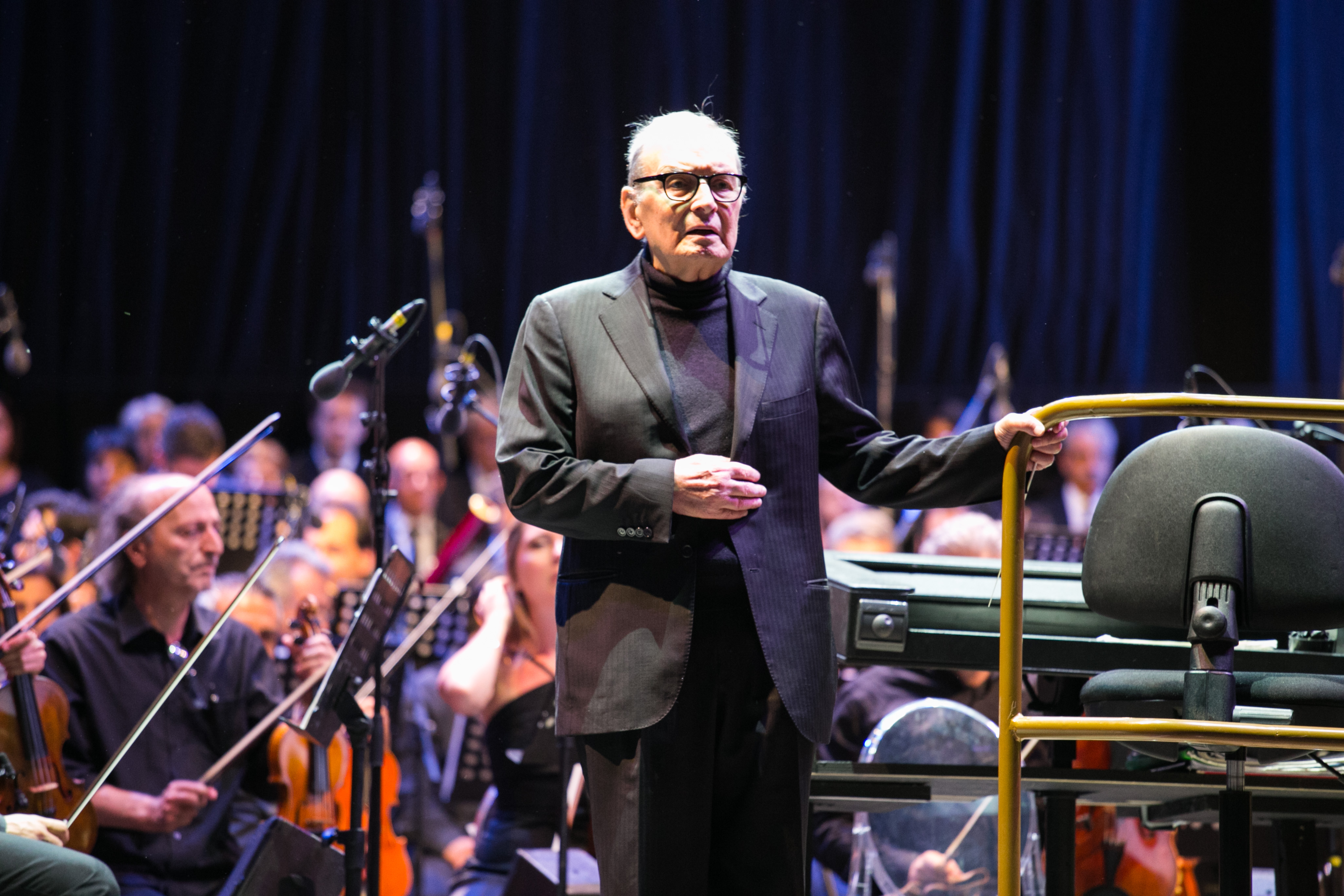 تصویر آهنگساز ایتالیایی، انیو موریکونه